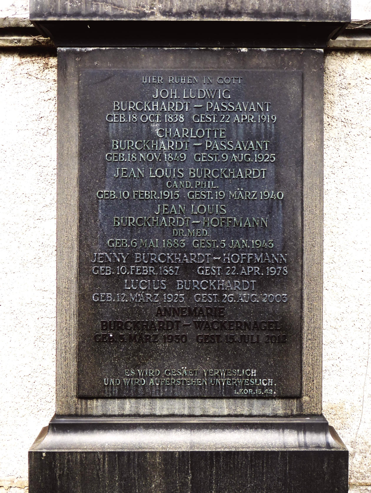 Annemarie Burckhardt-Wackernagel (1930-2012) Objektkünstlerin, Grab, Friedhof Wolfgottesacker, Basel